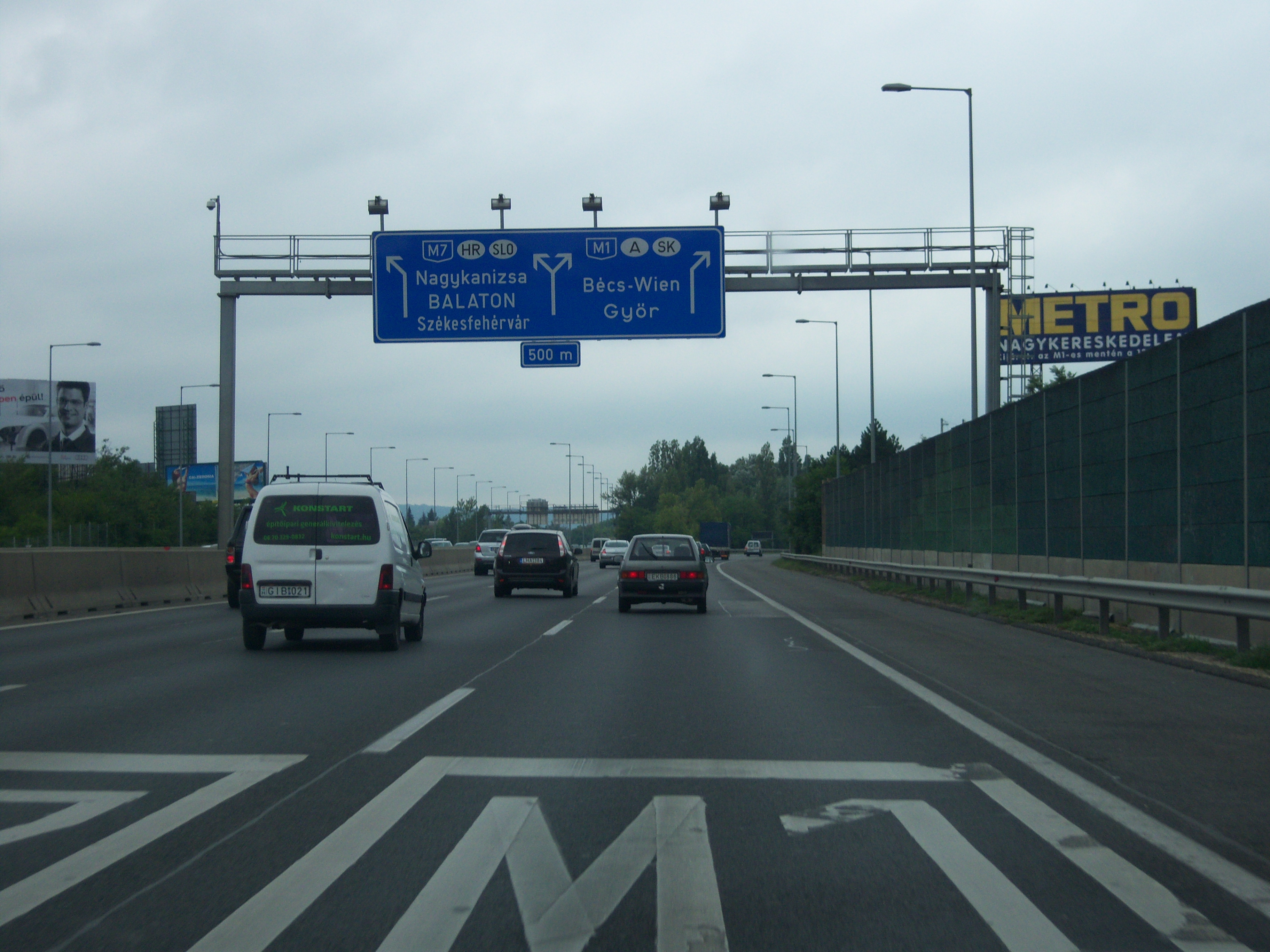 Abzweigung der Autópálya M1 Richtung Wien und M7 Richtung Balaton in Budapest